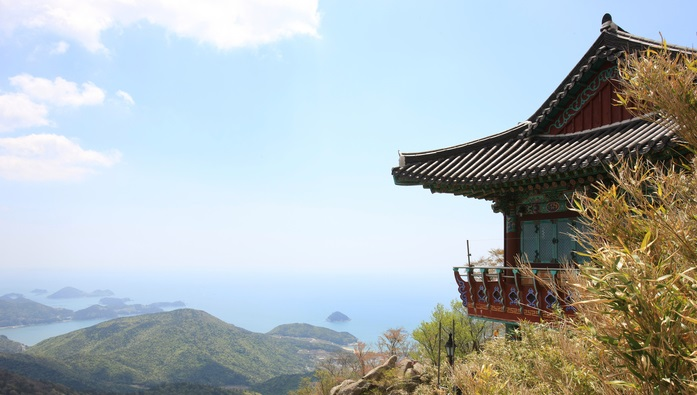 보리암에서 남해를 향한 풍경